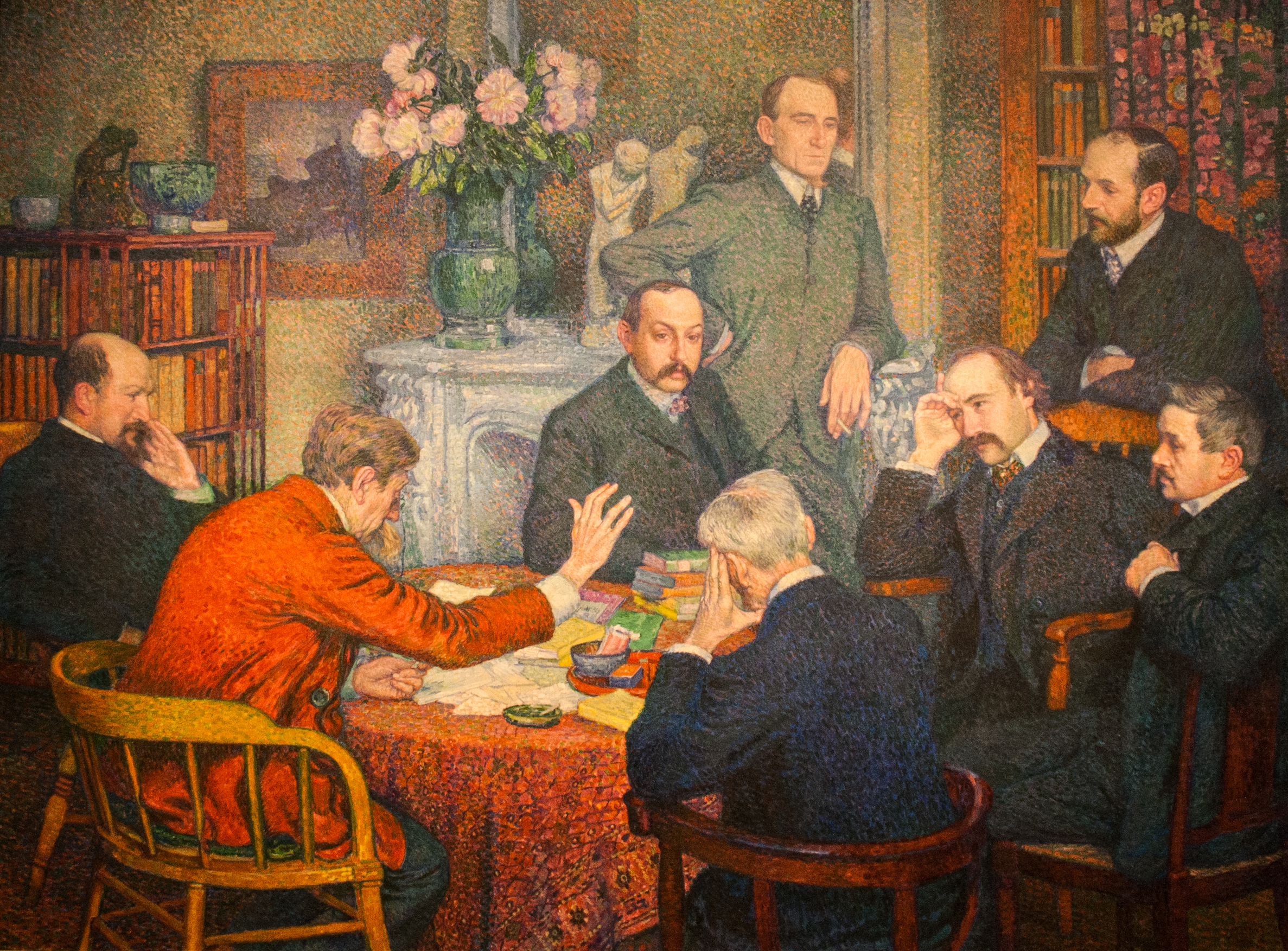 participants from left: Félix Le Dantec; Émile Verhaeren; Francis Vielé-Griffin; Henri-Edmond Cross; André Gide; Maurice Maeterlinck; Félix Fénéon; Henri Ghéon.